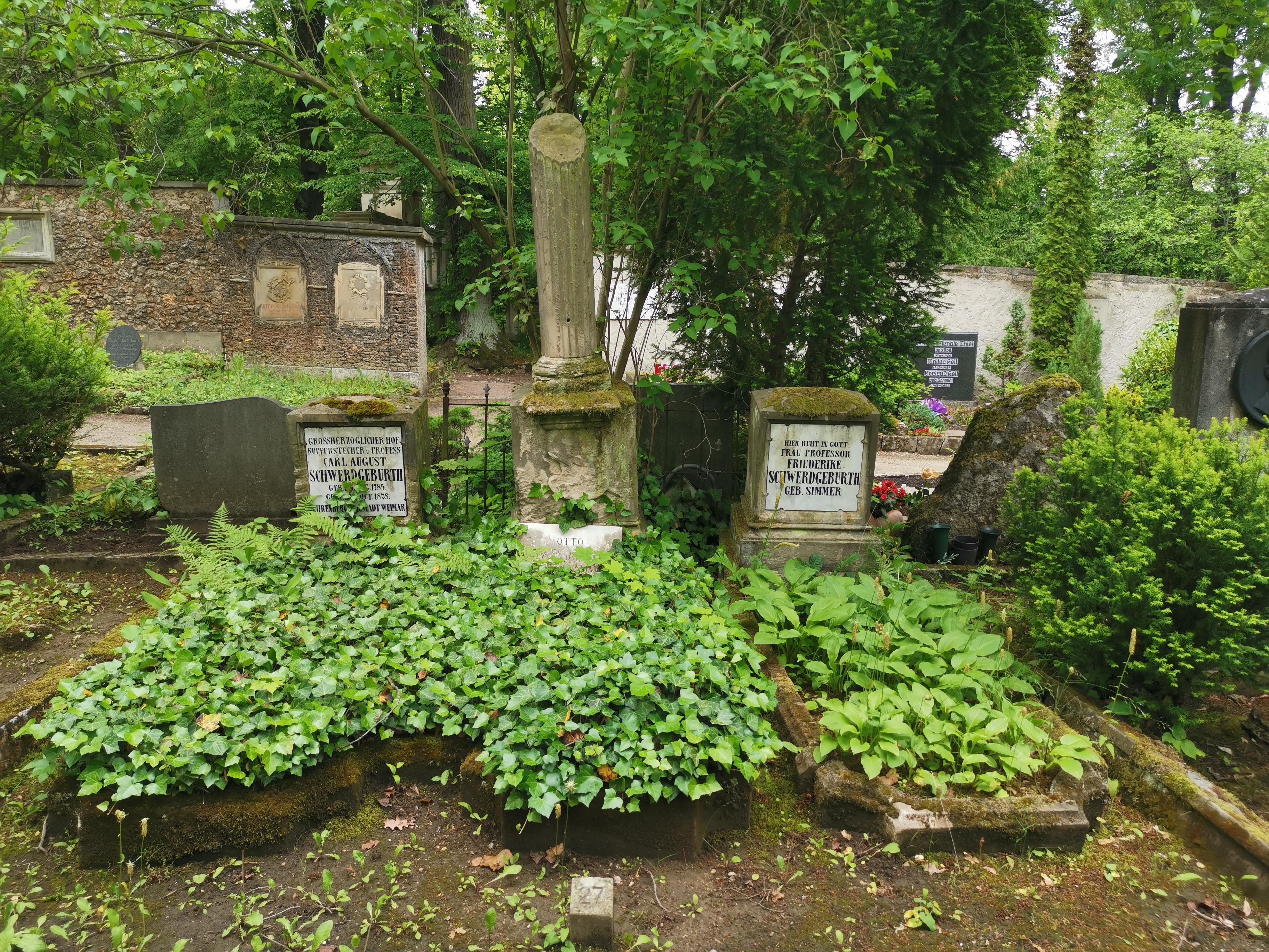 Grabstätte Prof. Carl August Schwerdgeburth; Historischer Friedhof Weimar